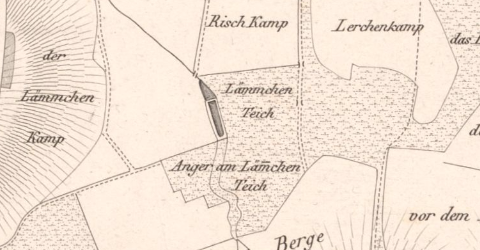 Der Lämmchenteich bei Braunschweig etwa 1835.